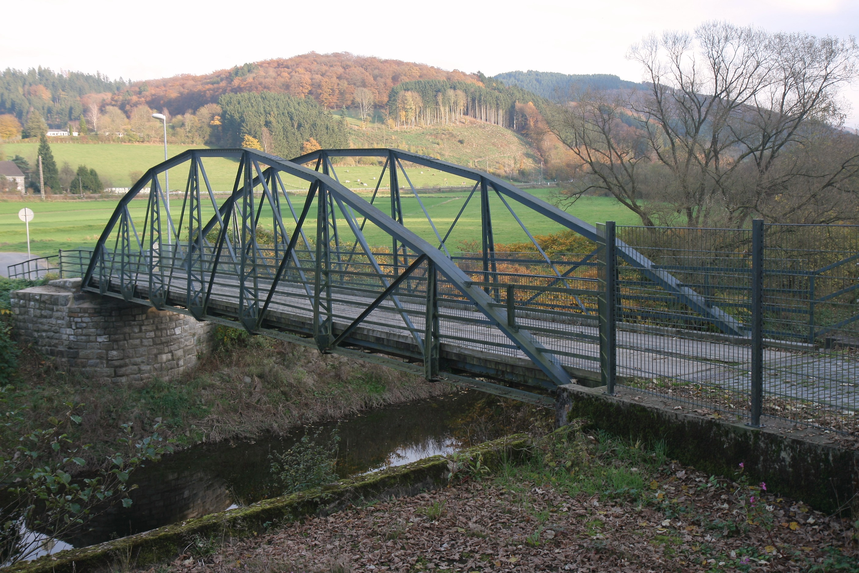 Lennebrücke Hilfringhausen in Plettenberg-Ohle. This image shows a heritage building in Germany, located in the North Rhine-Westphalian city Plettenberg (no. 15).